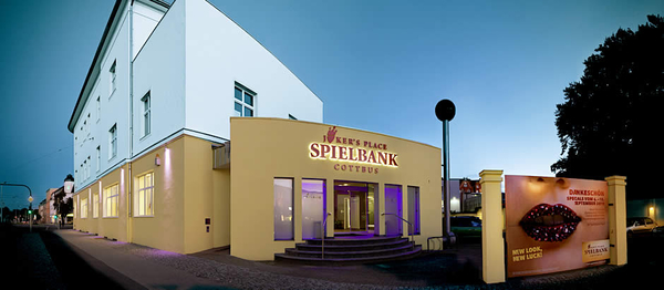 Der Eingang zur Spielbank Cottbus in der Straße der Jugend 117-119.